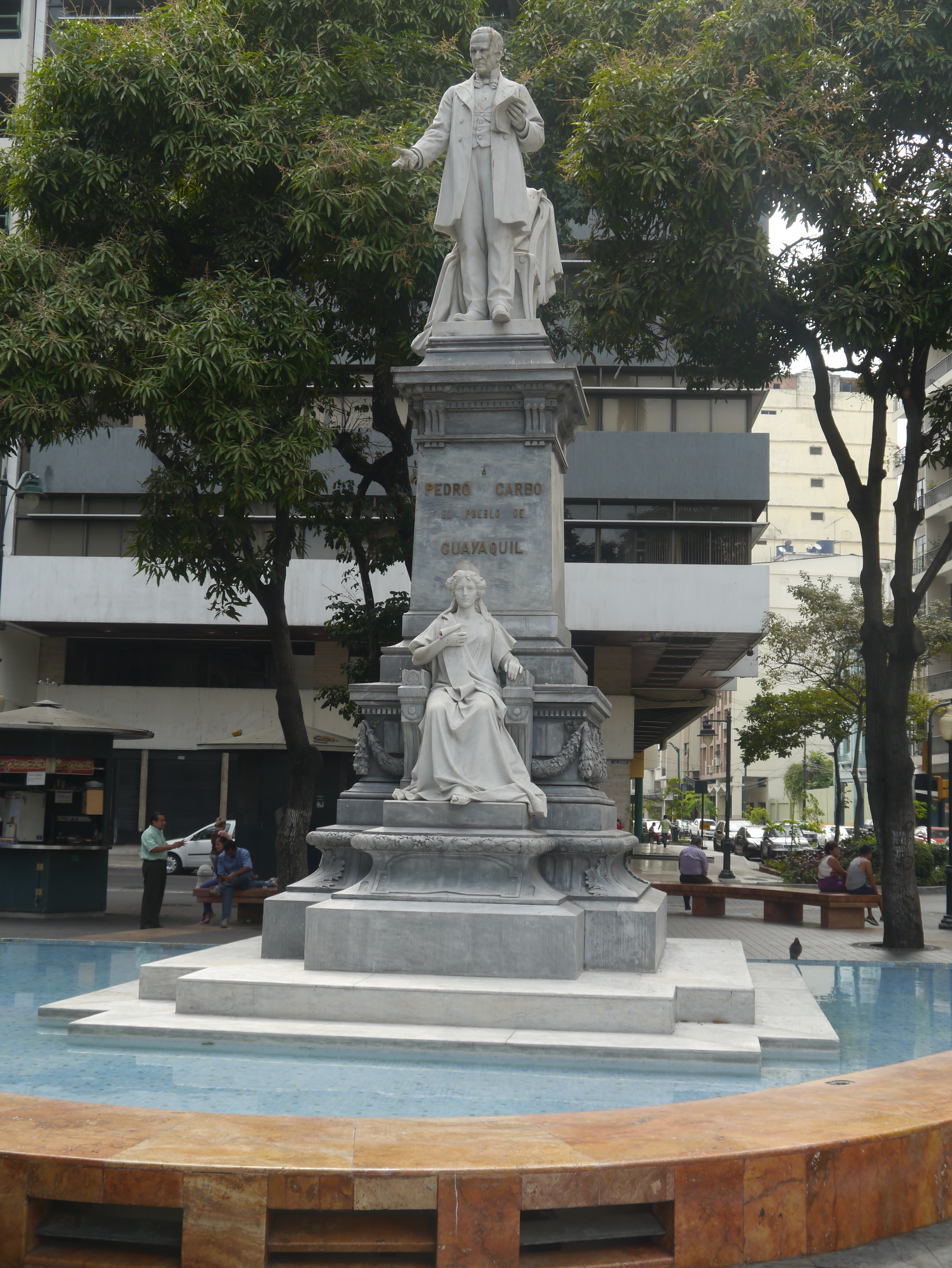 Monumento a Pedro Carbo en 2015